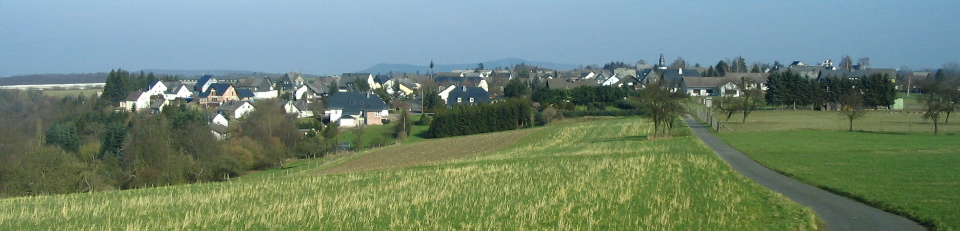 Westansicht von Alstrimmig im Hunsrück